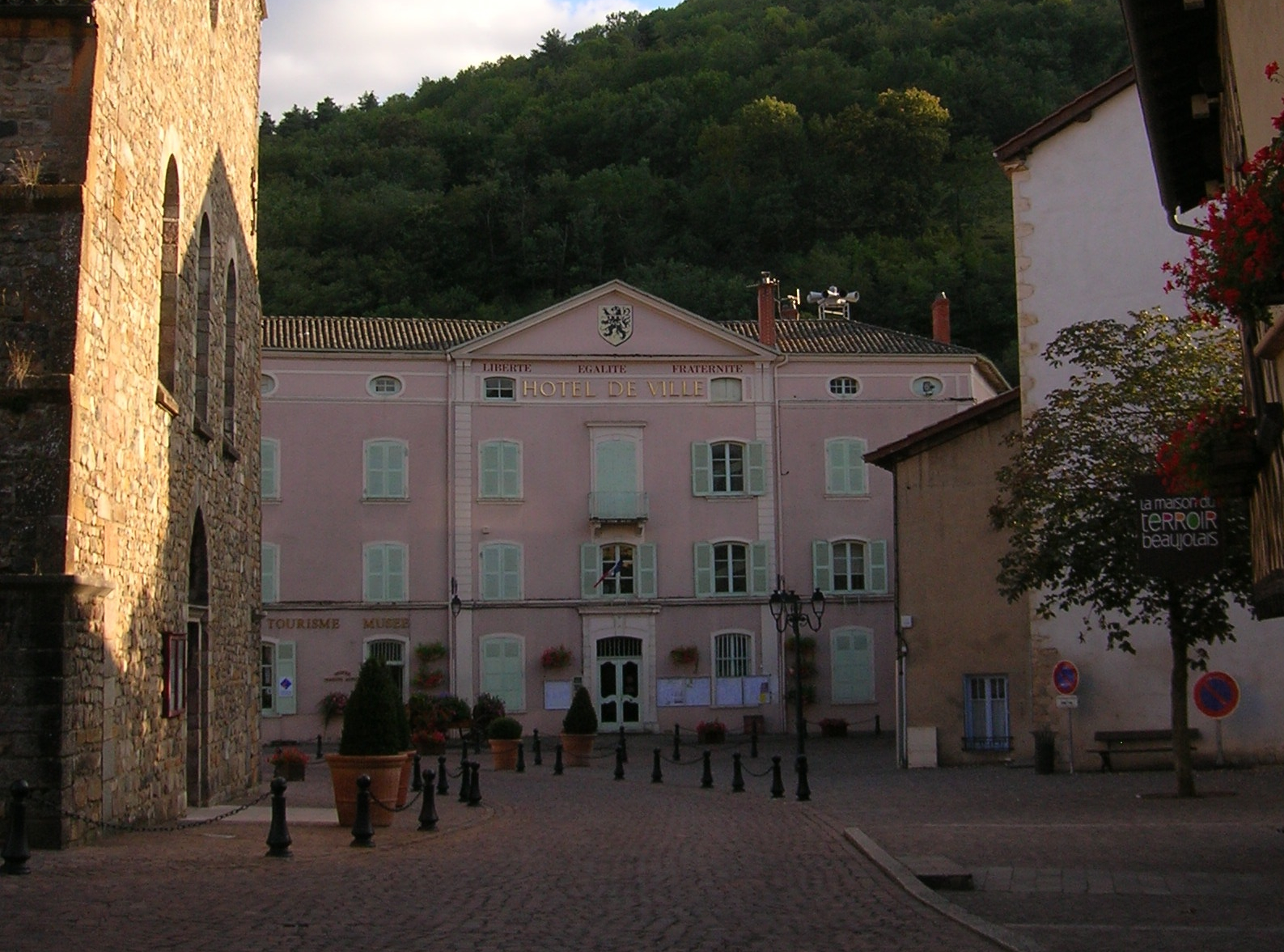 Beaujeu (Rhône, France).